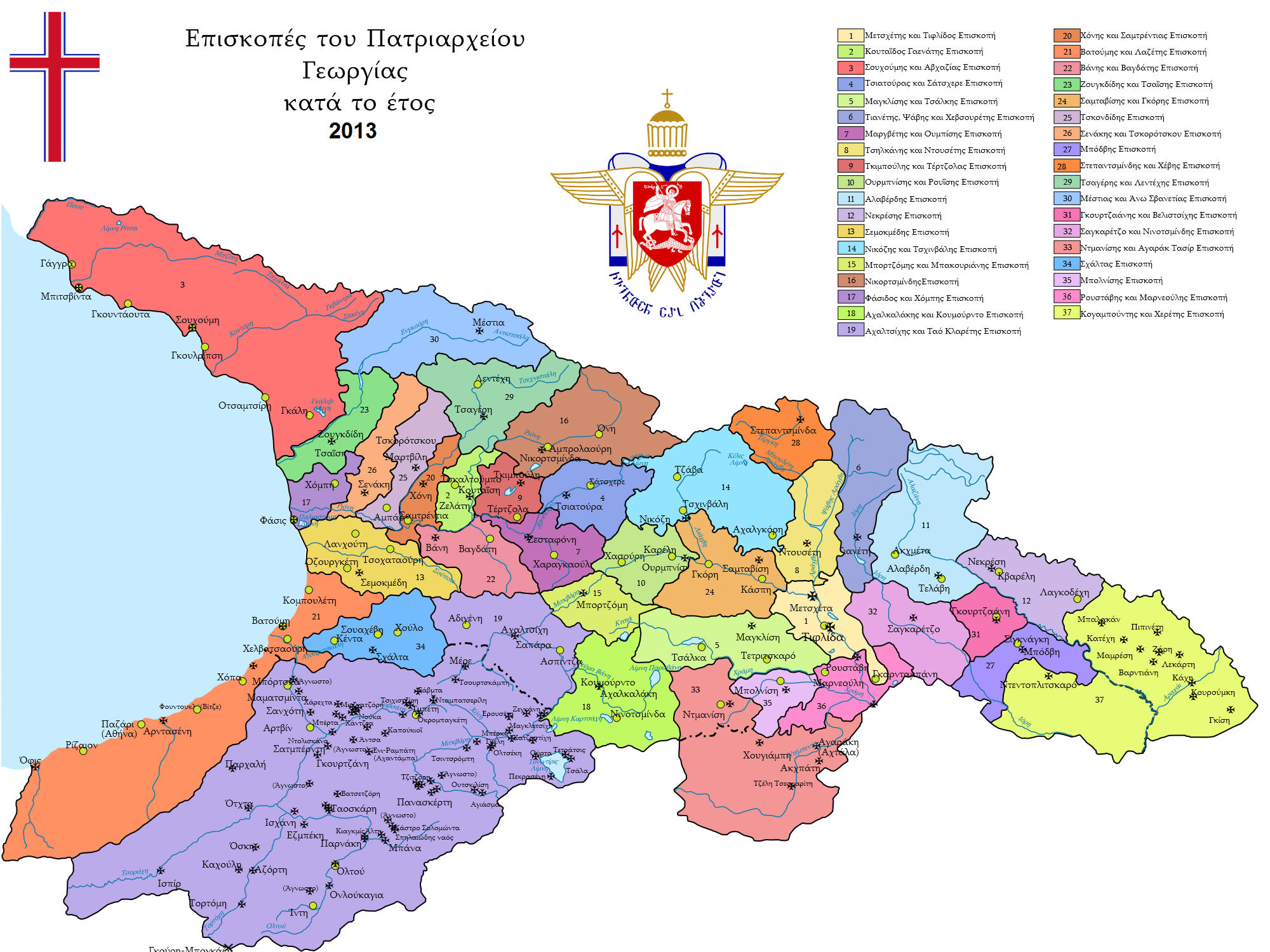 Επισκοπές του πατριαρχείον Γεωργίας κατά το έτος 2013